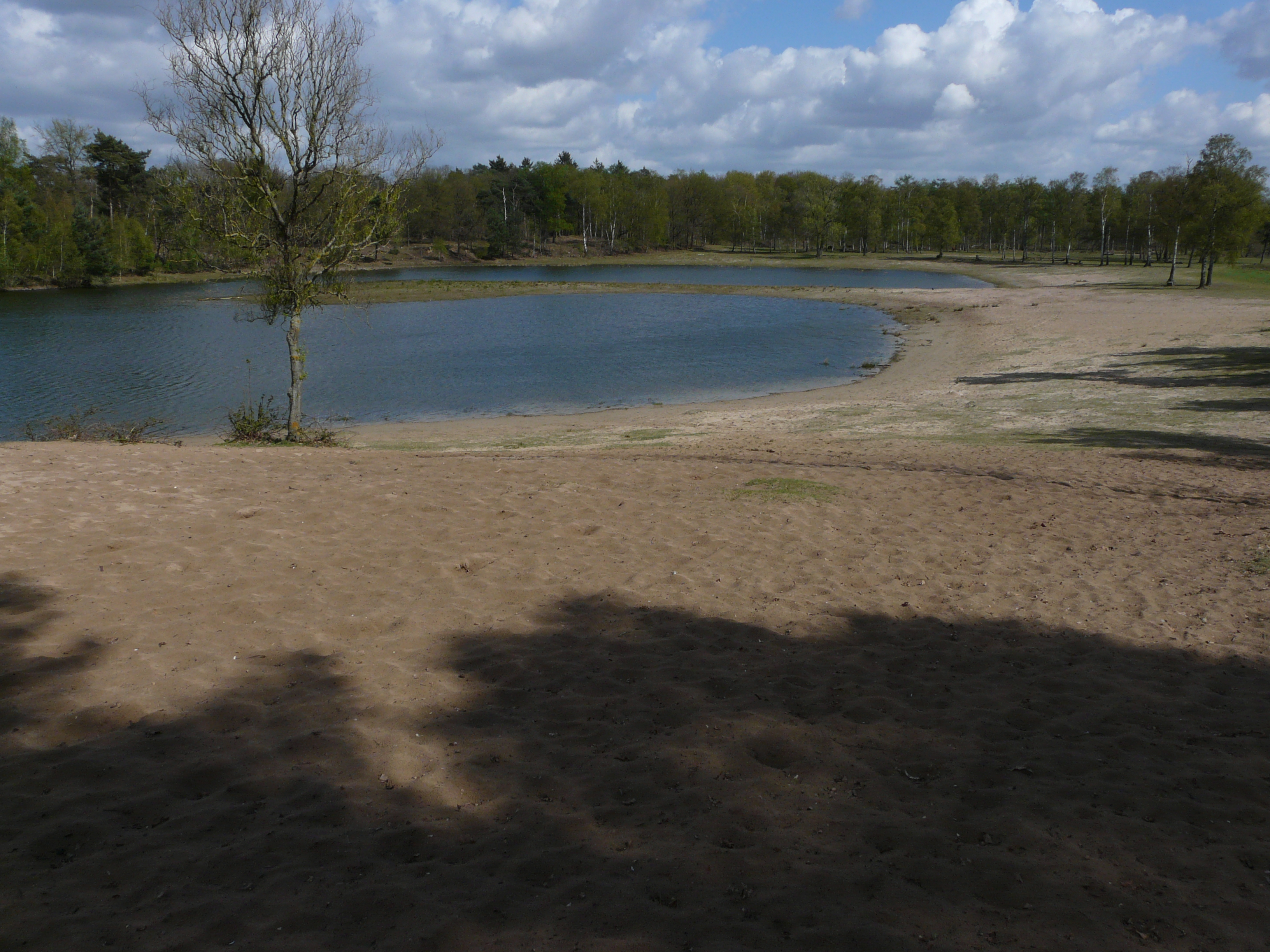 Zicht op de natuur bij de Leemputten in een deel van de Boswachterij Dorst nabij Dorst